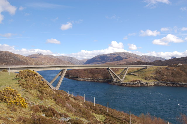 Kylesku Bridge